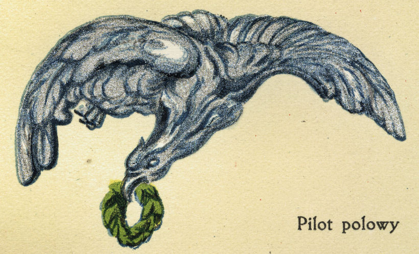 Polowa Odznaka Pilota 1928.